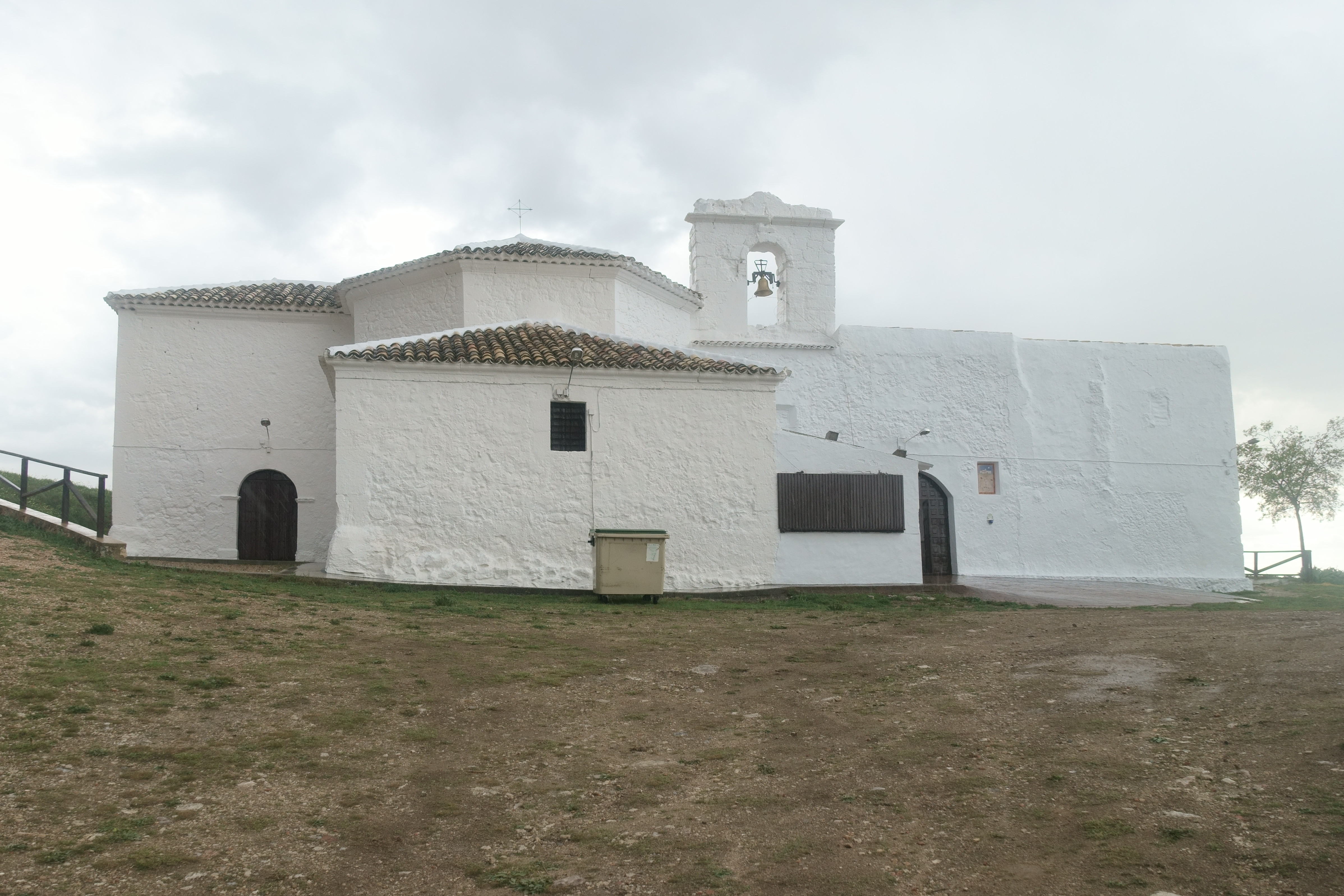 Ermita de la Virgen de la Cuesta, en Alconchel de la Estrella (Cuenca, España).